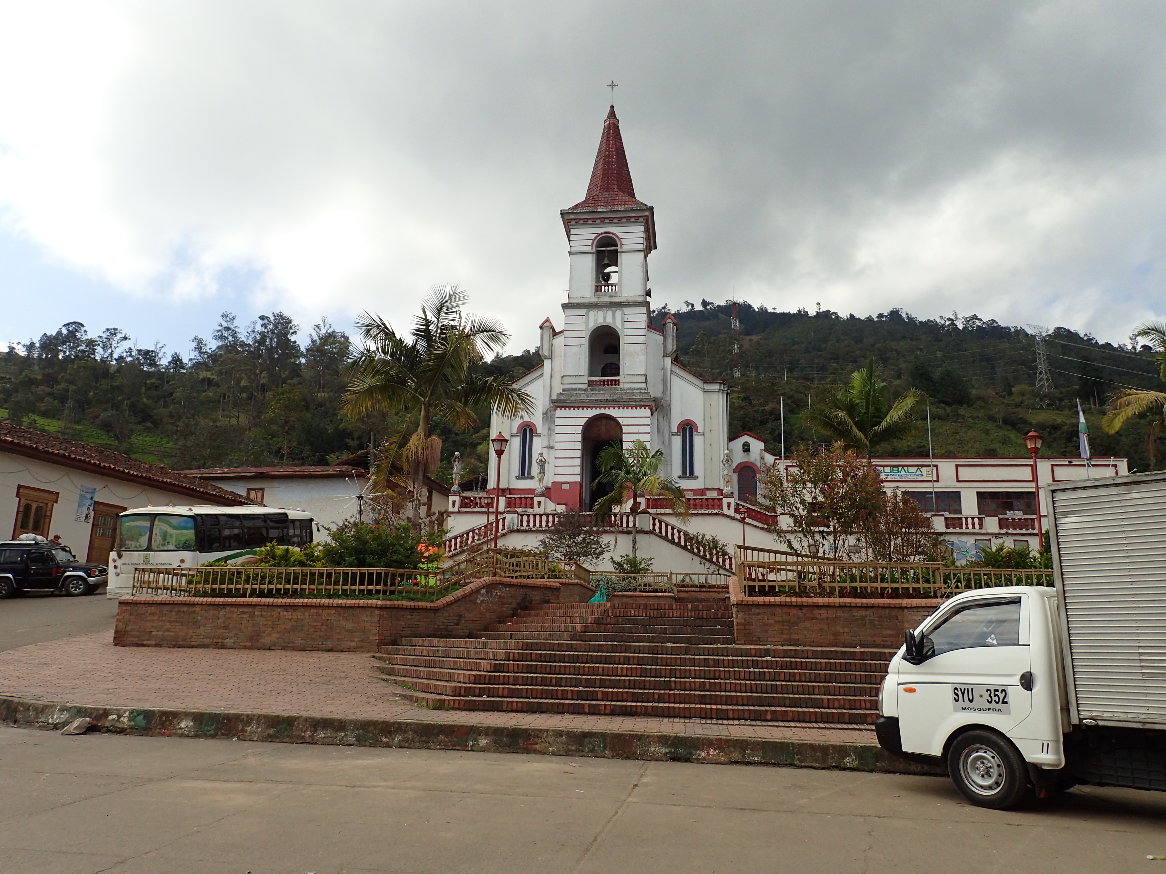 Esta fotografía fue tomada en el municipio colombiano con código 25839.